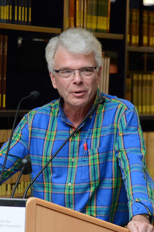 Helmut Stubbe da Luz während einer Vorlesung an der Helmut Schmidt Universität Hamburg